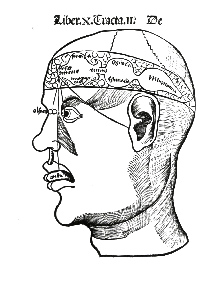 Gregor Reisch, 1512. Margarita philosophica nova cui insunt sequentia